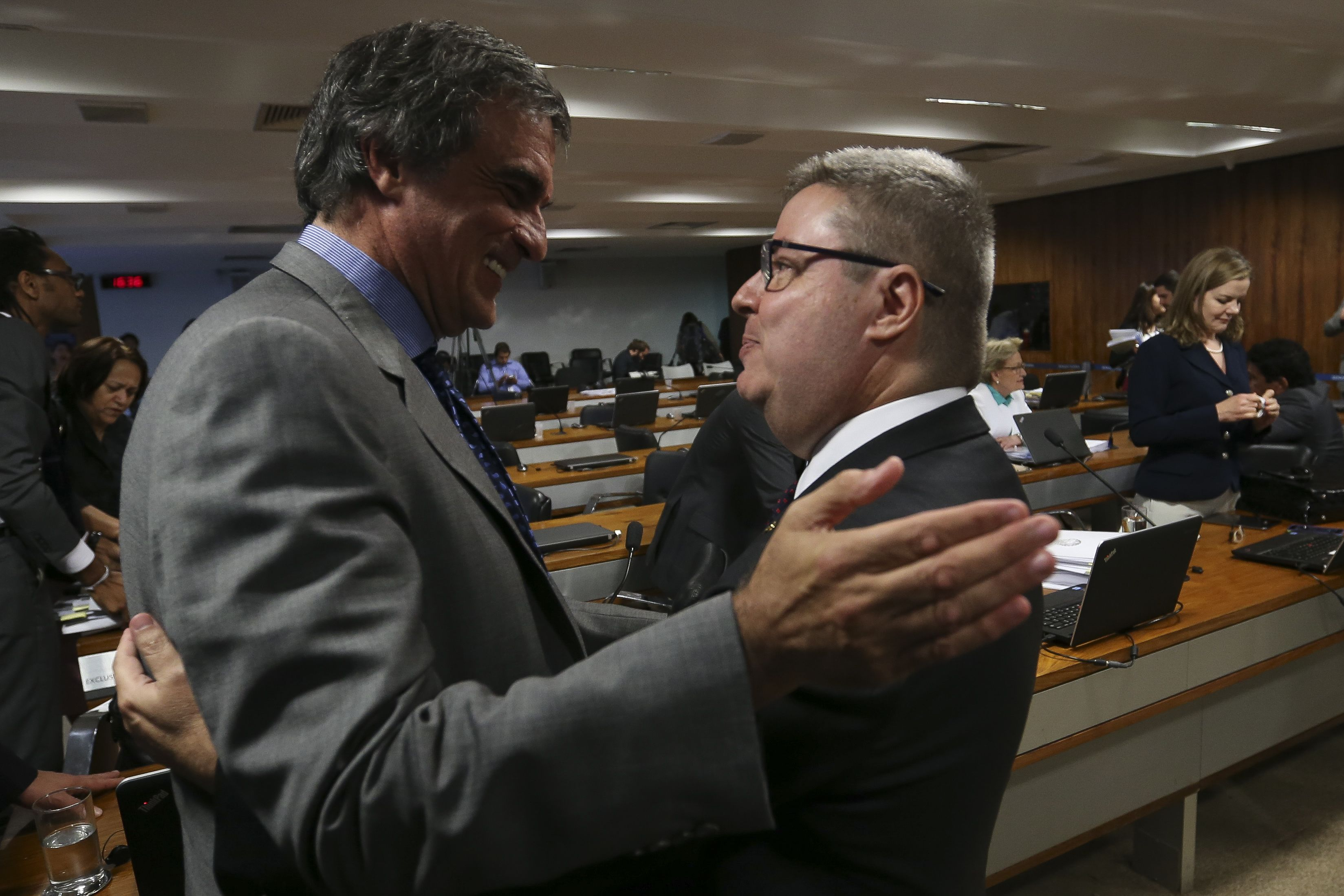 José Eduardo Cardozo cumprimenta o relator Antônio Anastasia, ao término da reunião da Comissão do Impeachment.